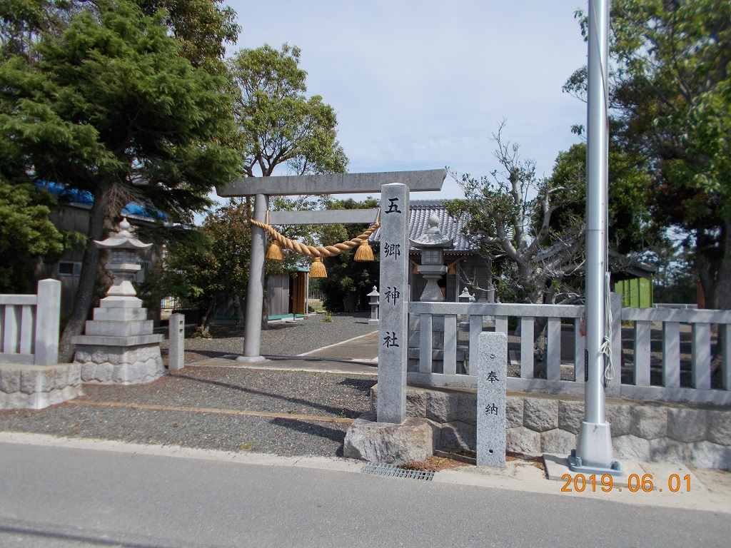 五郷 (ごごう)神社。豊橋市神野 (じんの)新田 (しんでん)町 (ちょう)セノ割93。参道正面から撮影。